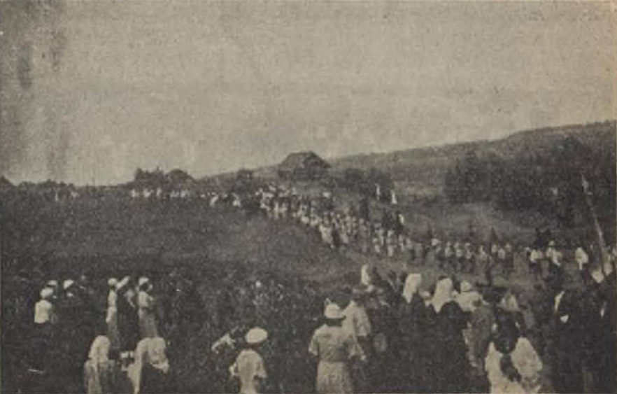 Беларуская (тарашкевіца): Вята (Viata). Асьвячэньне звона